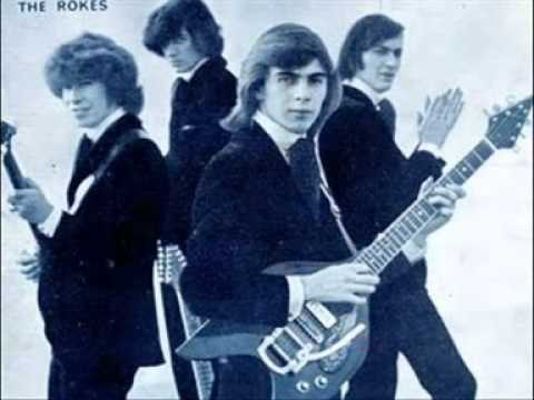 Il gruppo musicale Rokes